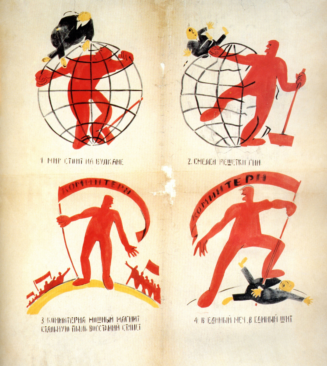 «Мир стоит на вулкане...». Окно РОСТА (согласно davno.ru) или Окно главполитсовета (согласно plakaty.ru)